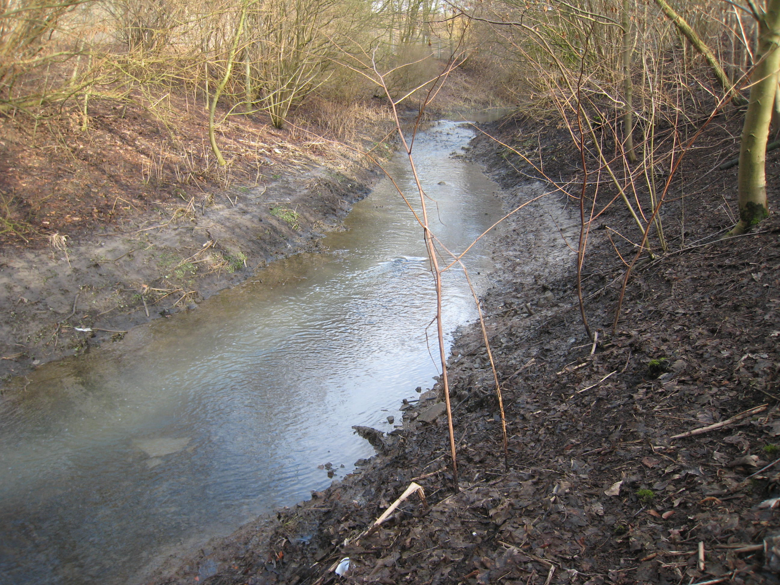 Renaturierte saubere Emscher in Dortmund-Hörde